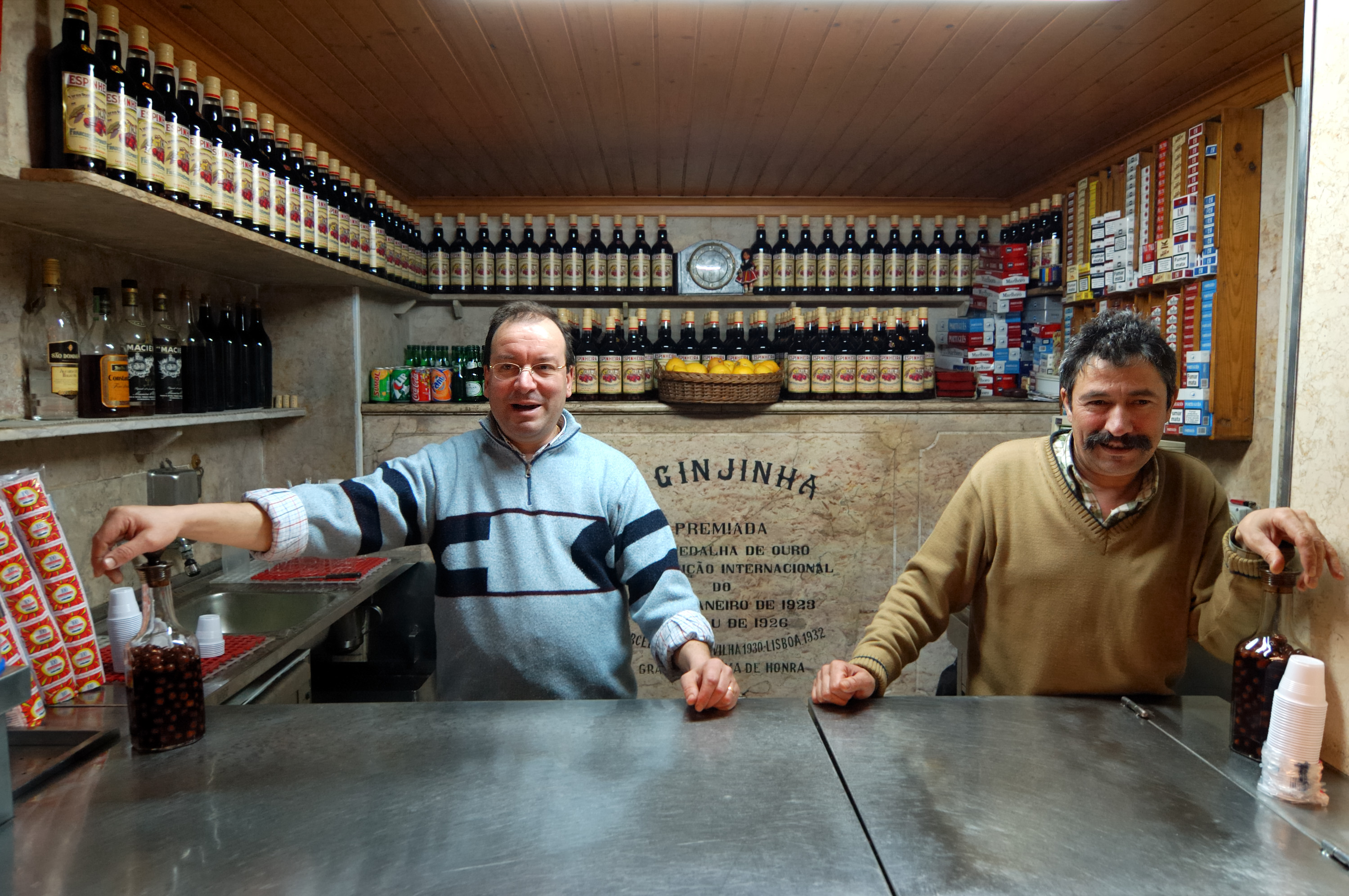 Lisbon, Portugal [2007]